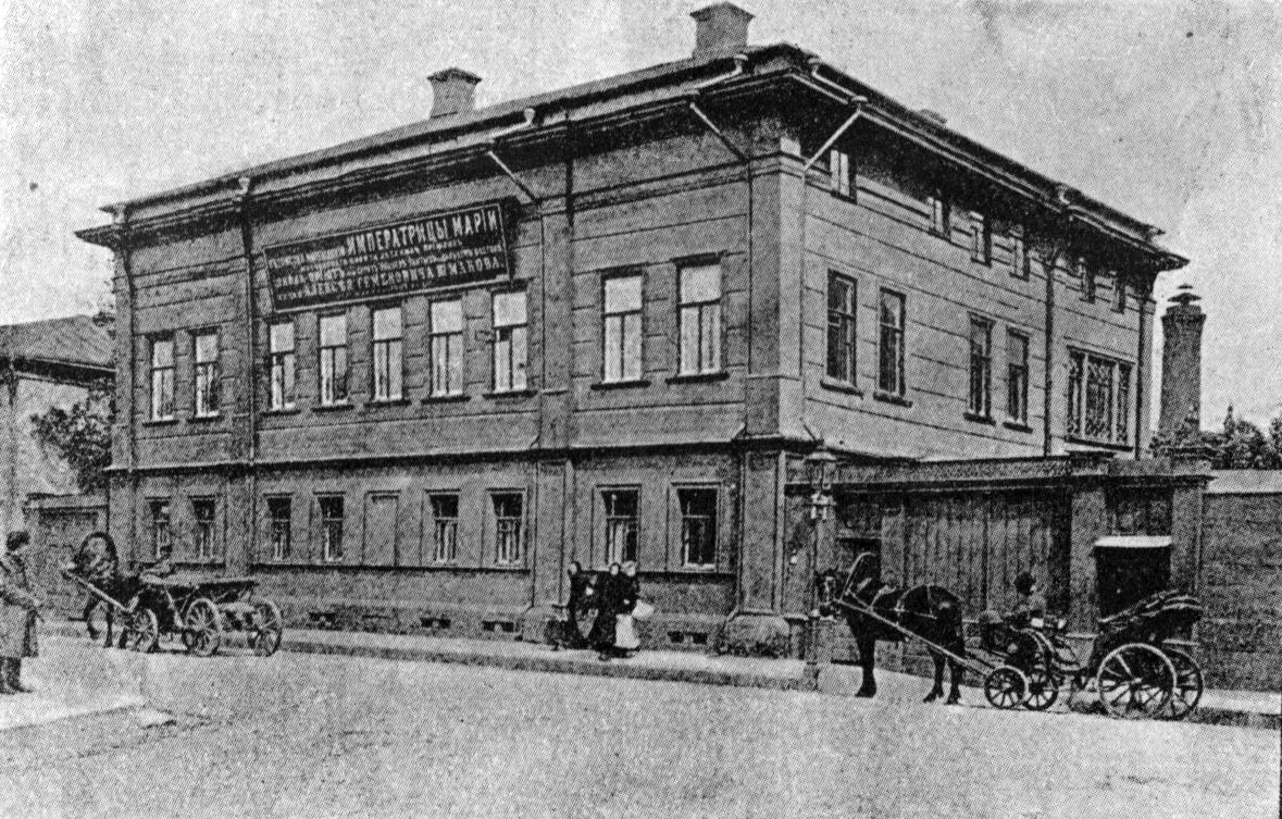 Здание приюта для сирот воинов, погибших в войне, имени А. С. Шмакова, в Бутиковском переулке, открытое в 1907 году.